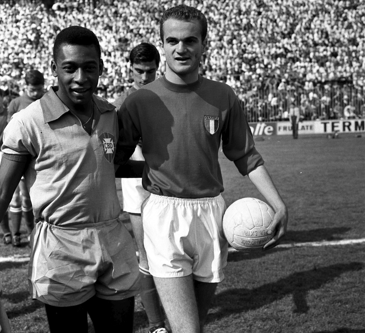 Milano, stadio San Siro, 12 maggio 1963. Da sinistra: il calciatore brasiliano Pelé e l'italiano Sandro Mazzola in occasione dell'amichevole tra Italia e Brasile (3-0).